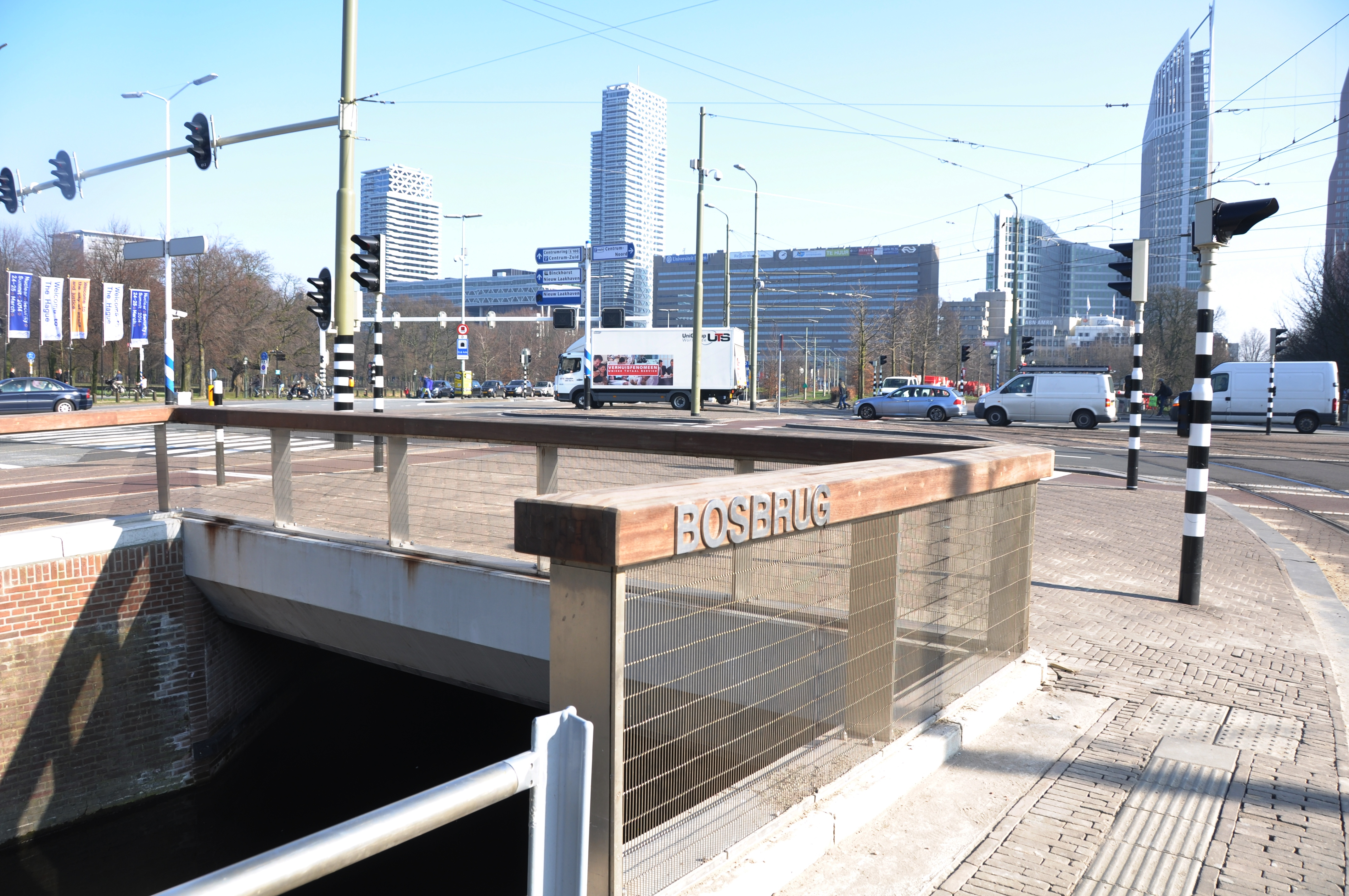 The new Hague Bridge GW 63 Bosbrug.